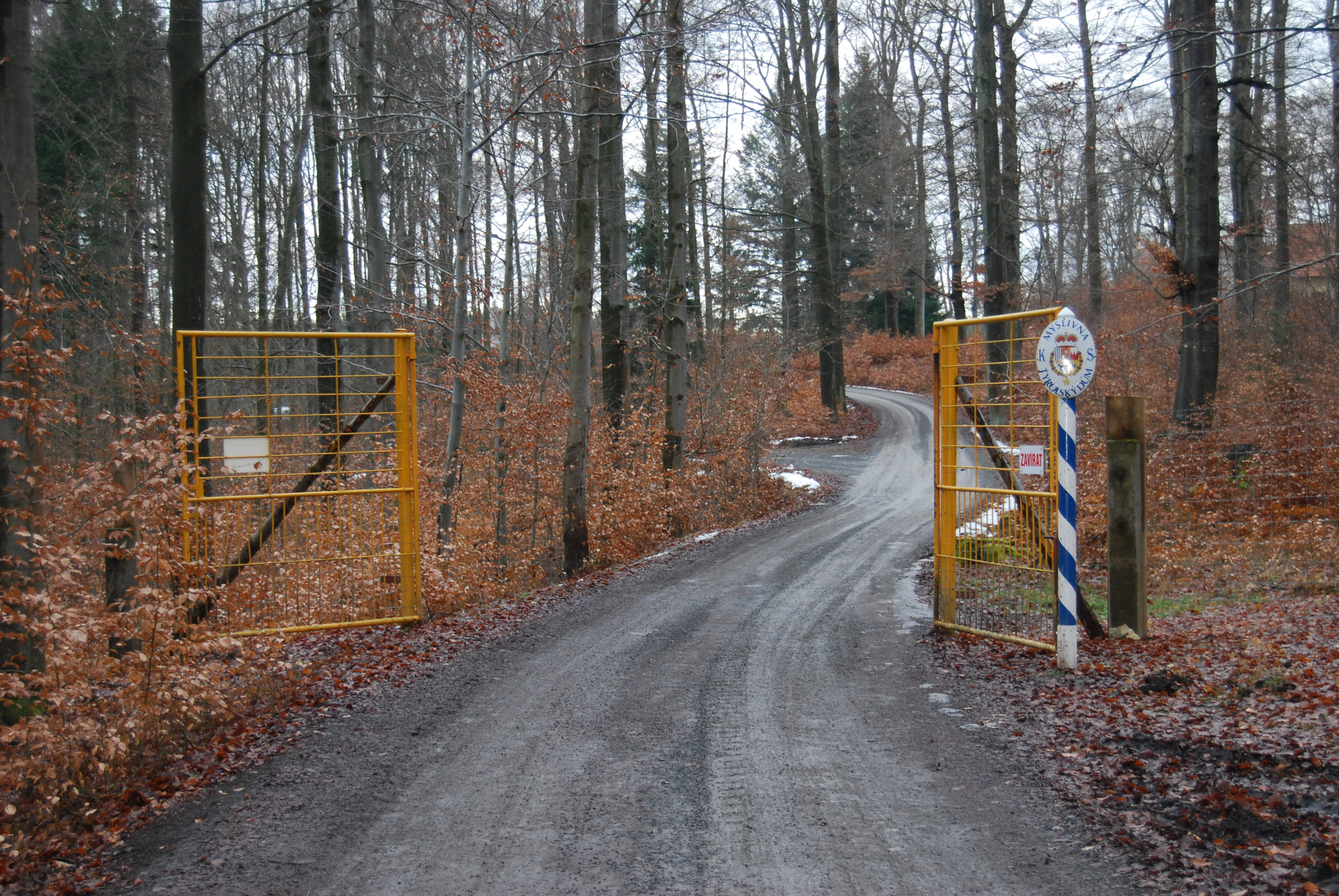 Rukávečská obora, zvaná též Květovská obora. Rukáveč - část města Milevsko v okrese Písek. Česká republika.